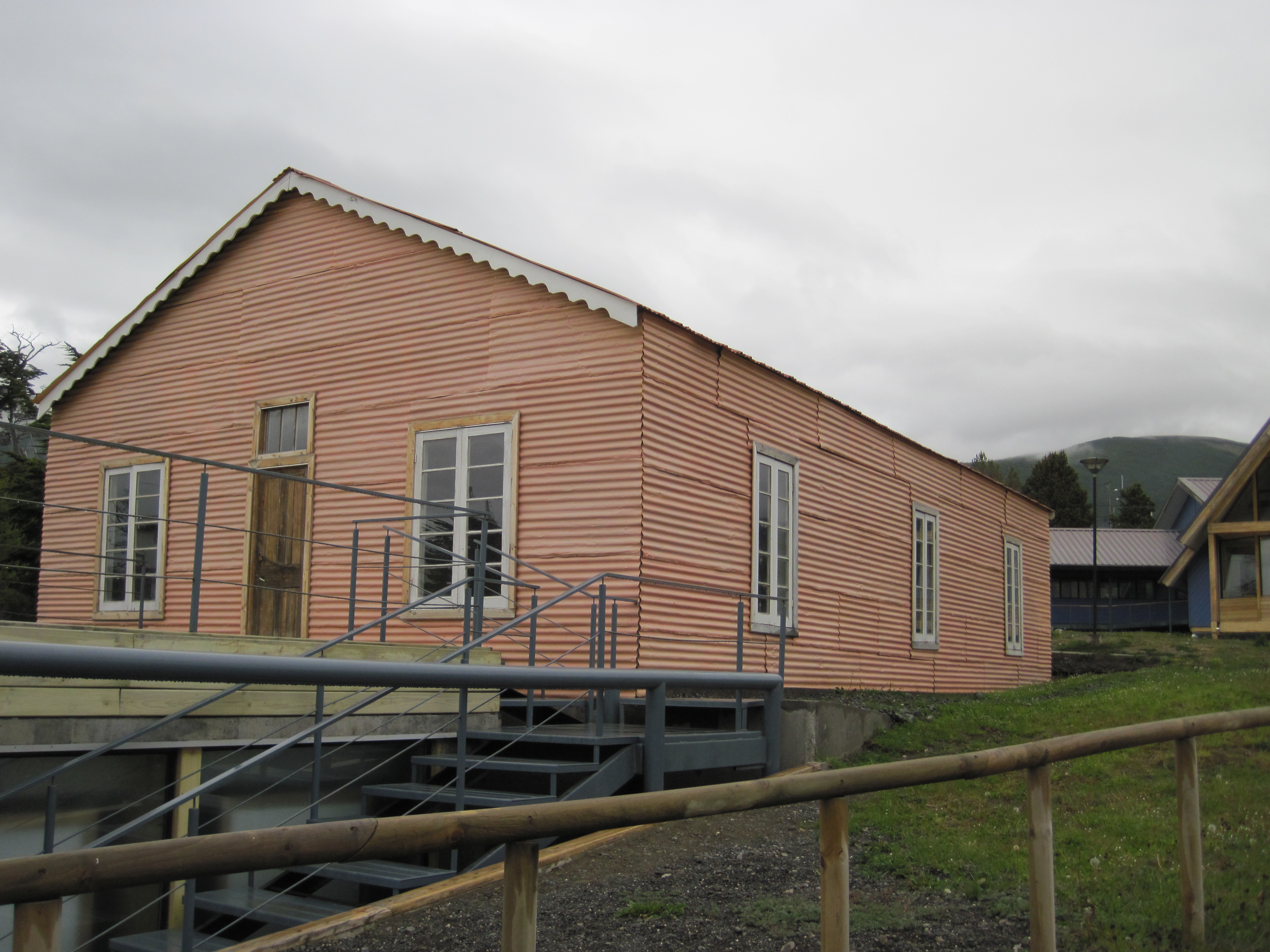 La primera casa construida en Ushuaia perteneciente al misionero anglicano Waite Hockin Stirling, fue trasladada desde su último emplazamiento, a orillas del canal Murray, en la isla chilena de Navarino, a la capital de esa isla, Puerto Williams, para funcionar como un museo de los religiosos ingleses que se aventuraron en el Beagle a fines de 1800. This is a photo of a national monument in Chile: 1818